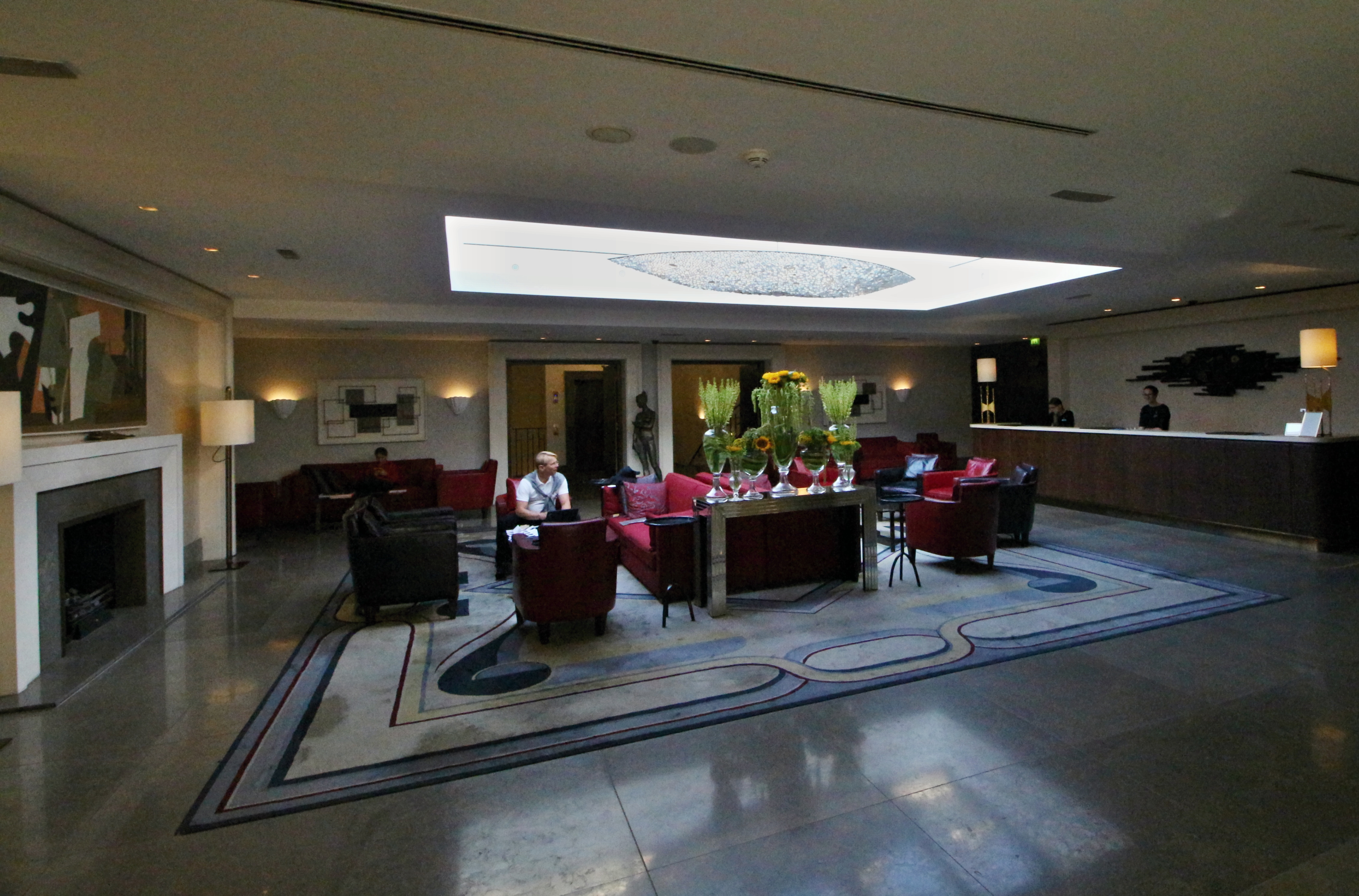 Malá Strana, klášter augustiniánů u sv. Tomáše